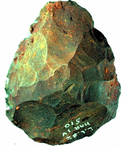 Biface obsidienne découverte près du Lac langano, Ethiopie - Musée de Melka Kunture (Obsidian handaxe from ethiopian acheulean period, found near Lake Langano, Ethiopia - Melka Kunture Museum)